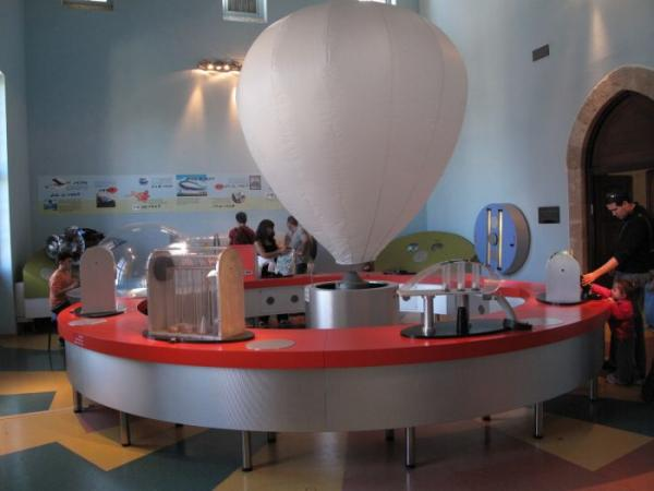 המחשה של כדור פורח